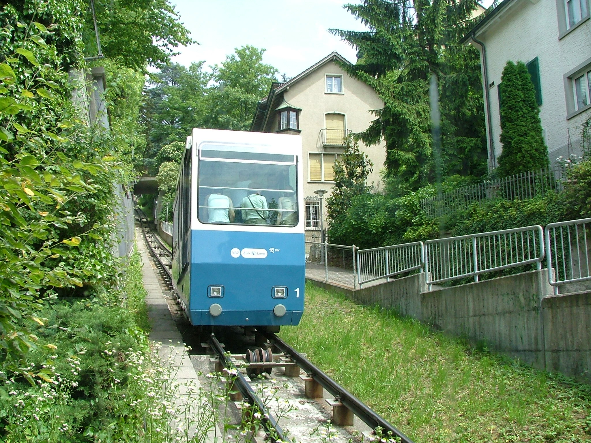 Kolej linowo-terenowa Rigiblick w Zurichu - 2006r.